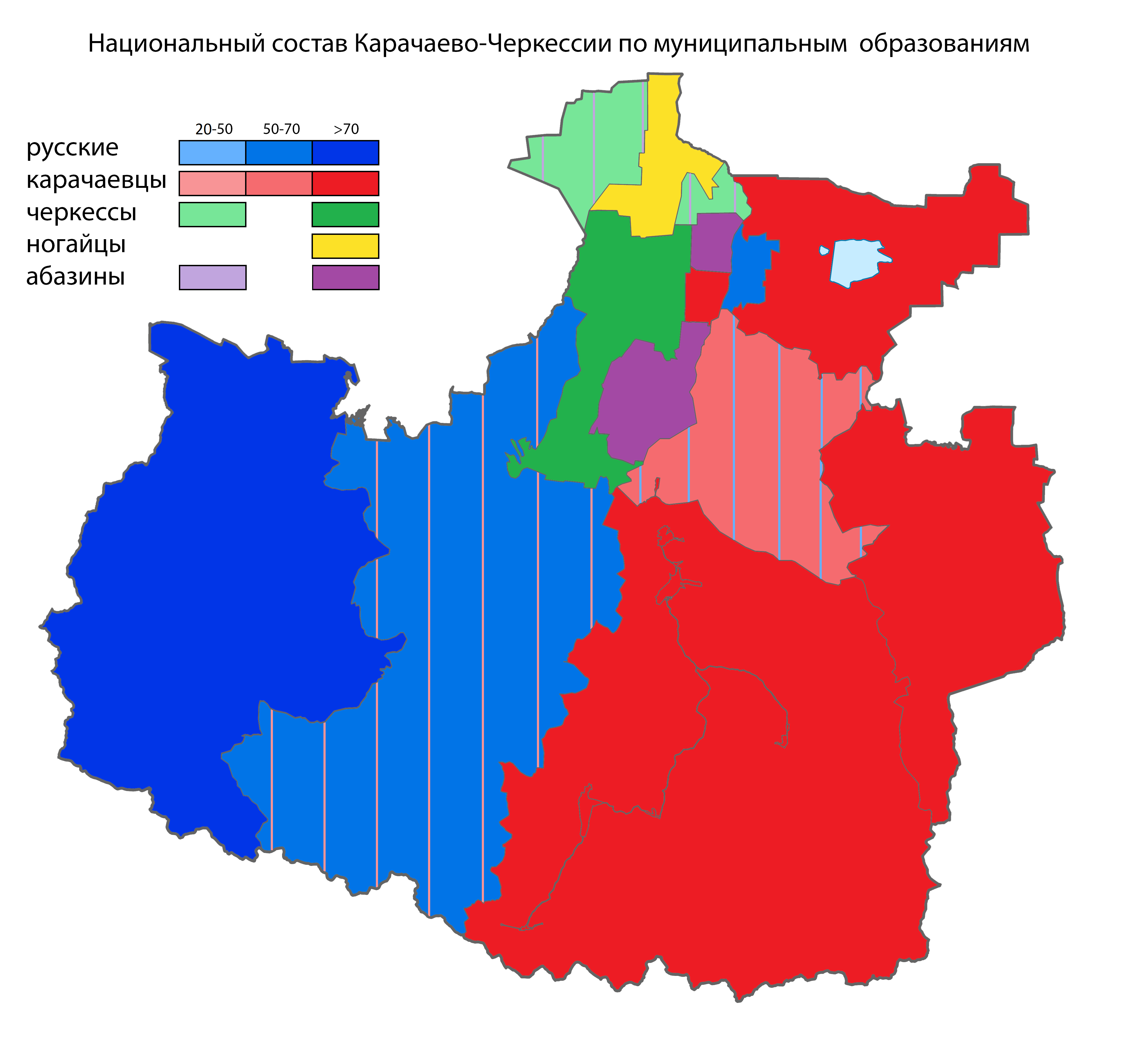 Население Карачаево-Черкессии по муниципальным образованиям по данным переписи населения 2010 г.